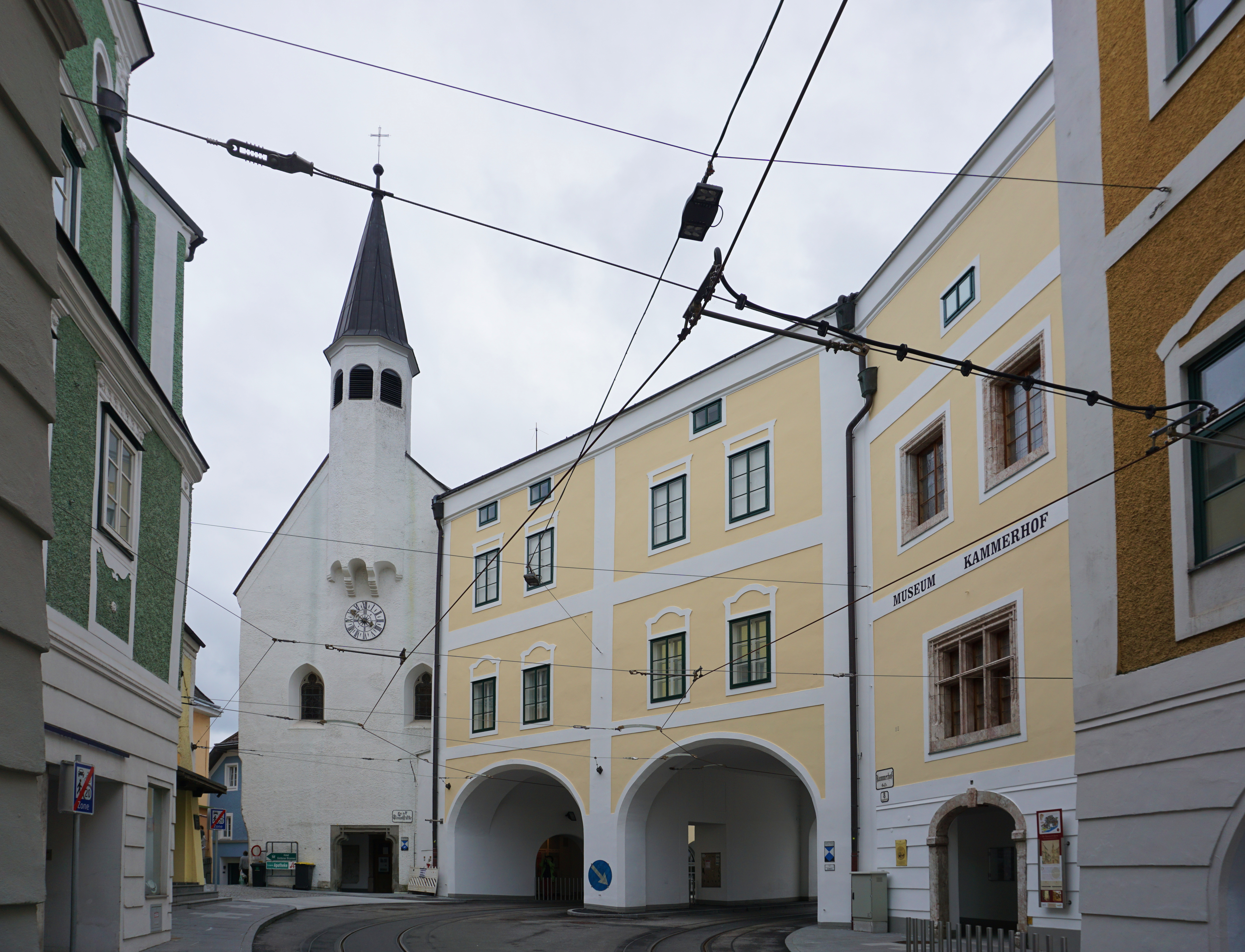 Gmunden Kammerhof von Westen